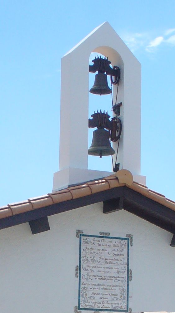 pelerinage